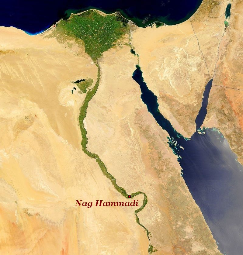 Imagen satelital de Egipto con la localización de la población de Nag Hammadi